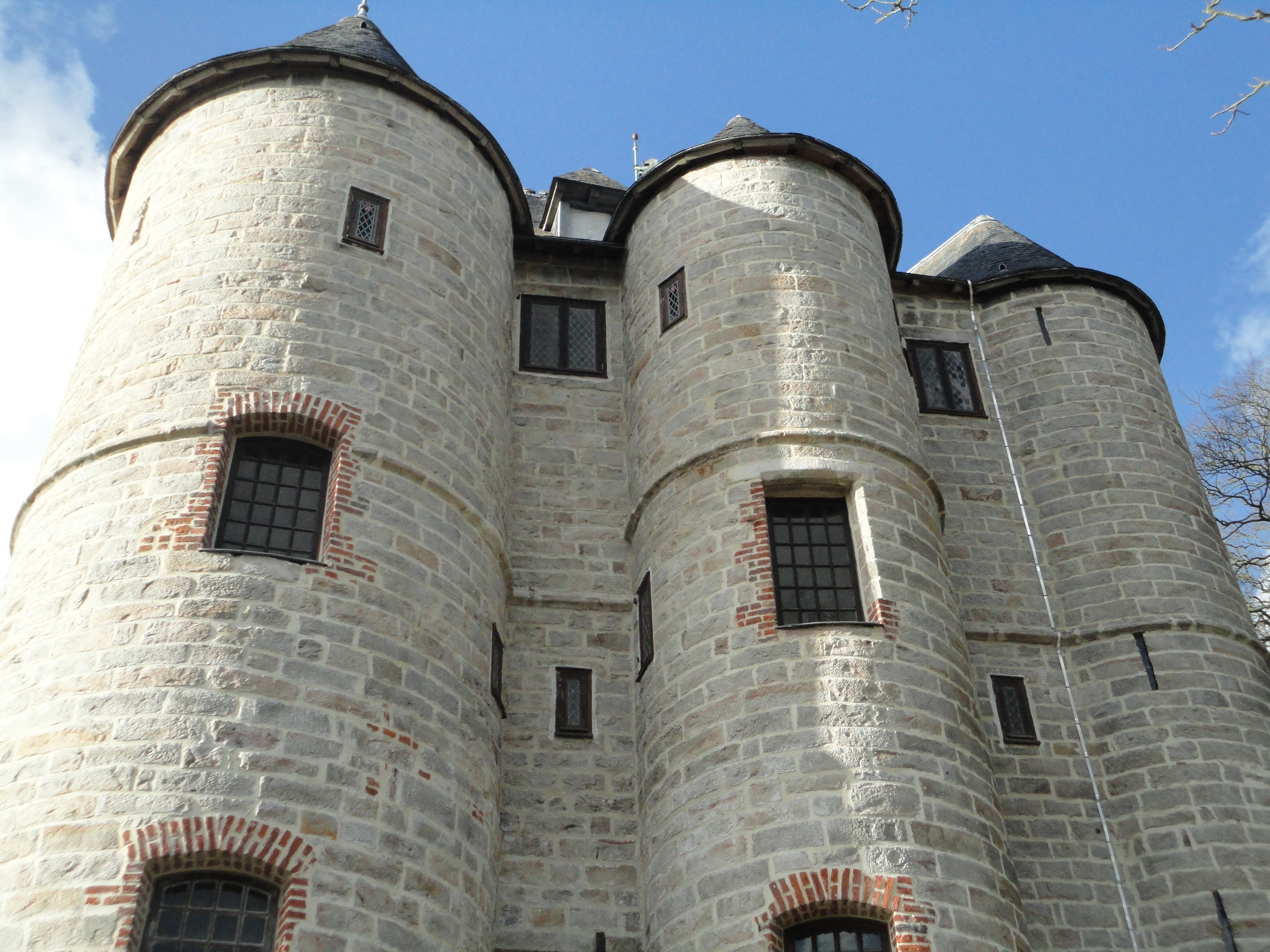 Façade sud avec les tourelles encorbellées au diamètre dégressif